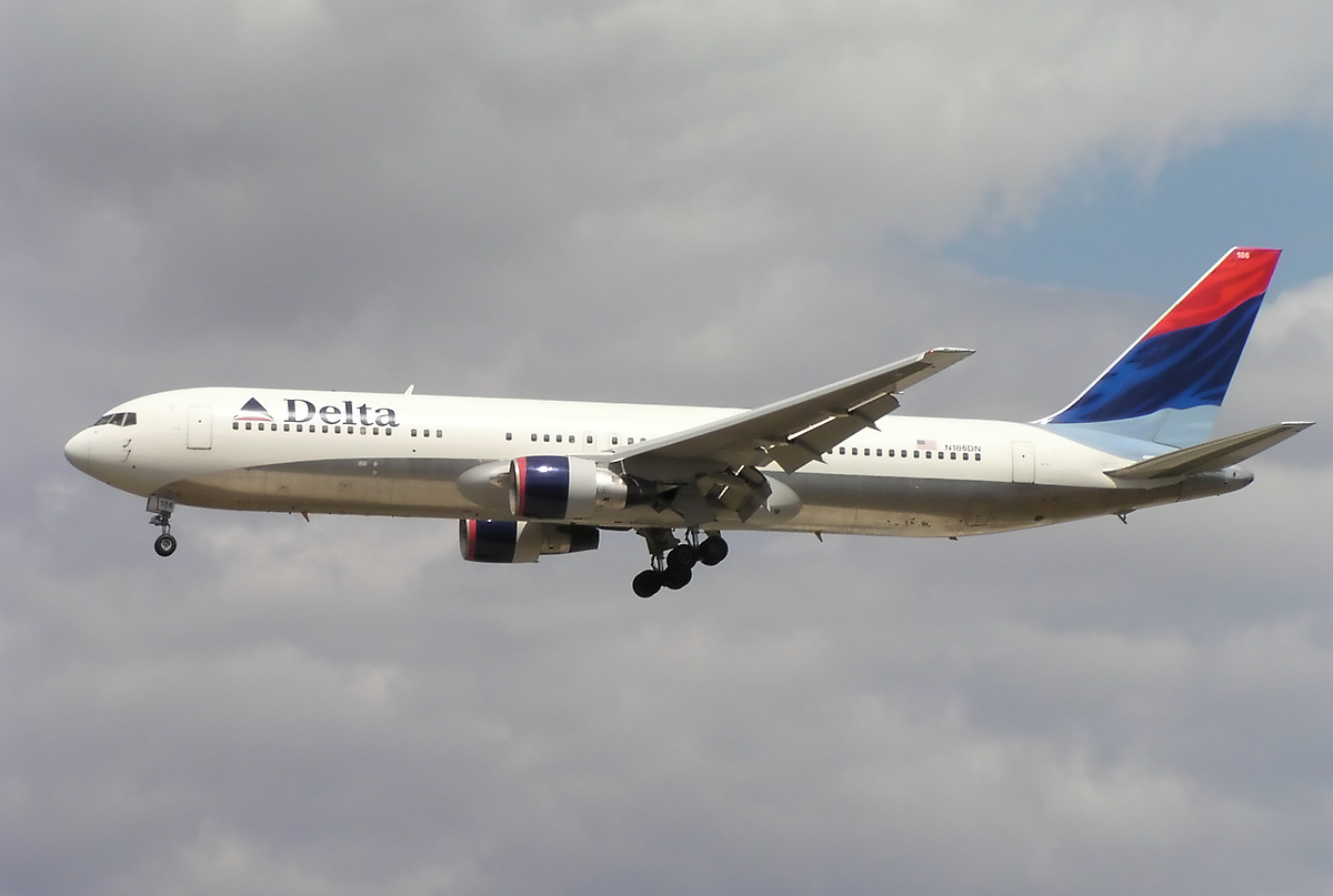 Delta Air Lines Boeing 767-300ER (N186DN) in Frankfurt (FRA/EDDF)